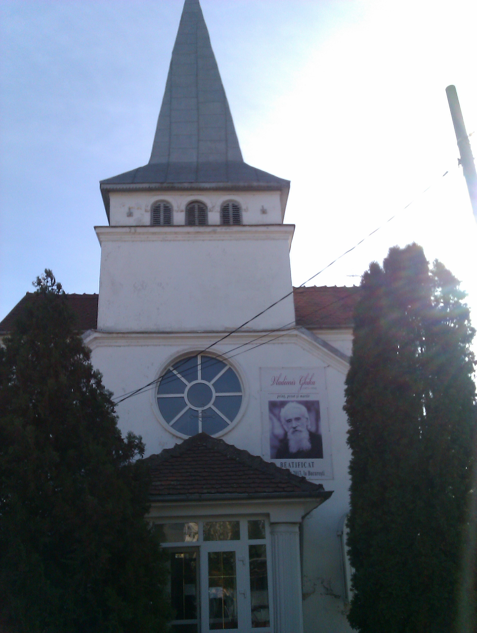 Biserica Romano-Catolică din Giurgiu.